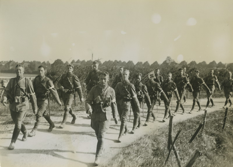 Het detachement van het Regiment Wielrijders uit Den Bosch onder commando van de kapitein W.L. Voncken op het parcours van 50 km. tijdens de 21e Vierdaagse.